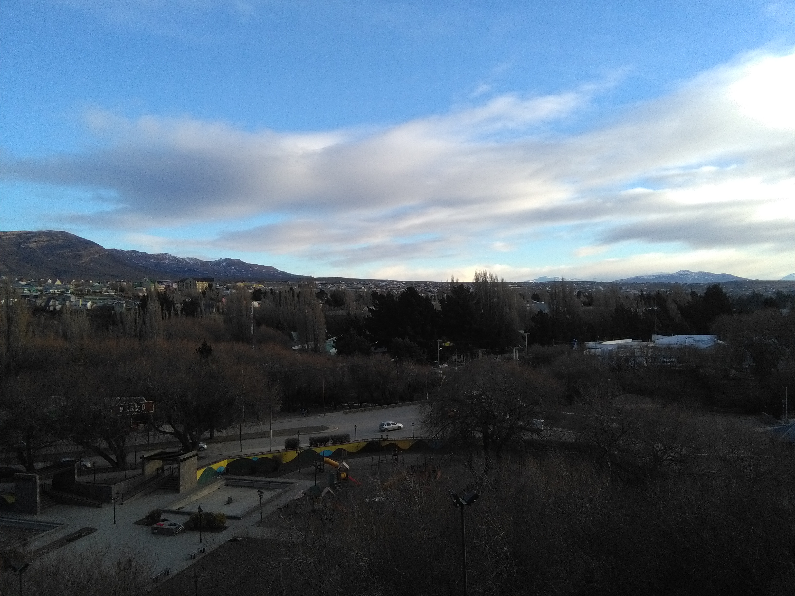 Desde la plaza de mi pueblo.